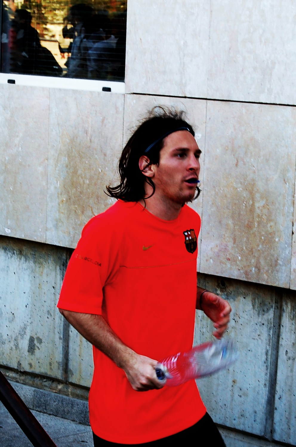 Lionel Messi